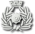 Fregio del Corpo degli ingegneri, esercito italiano